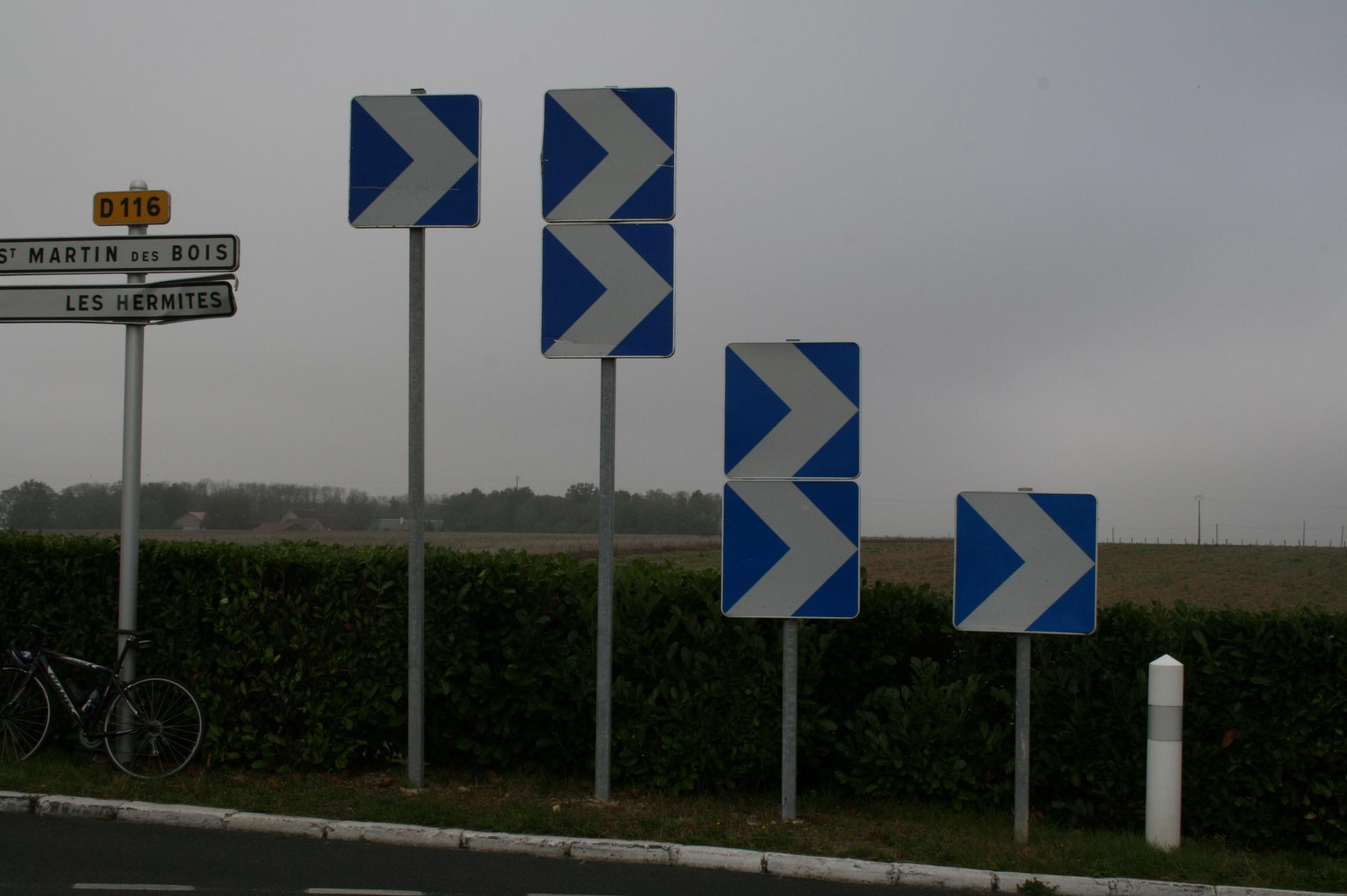 Balises J4 dans un virage présentant par ailleurs une perte de tracé due à une forte pente (France